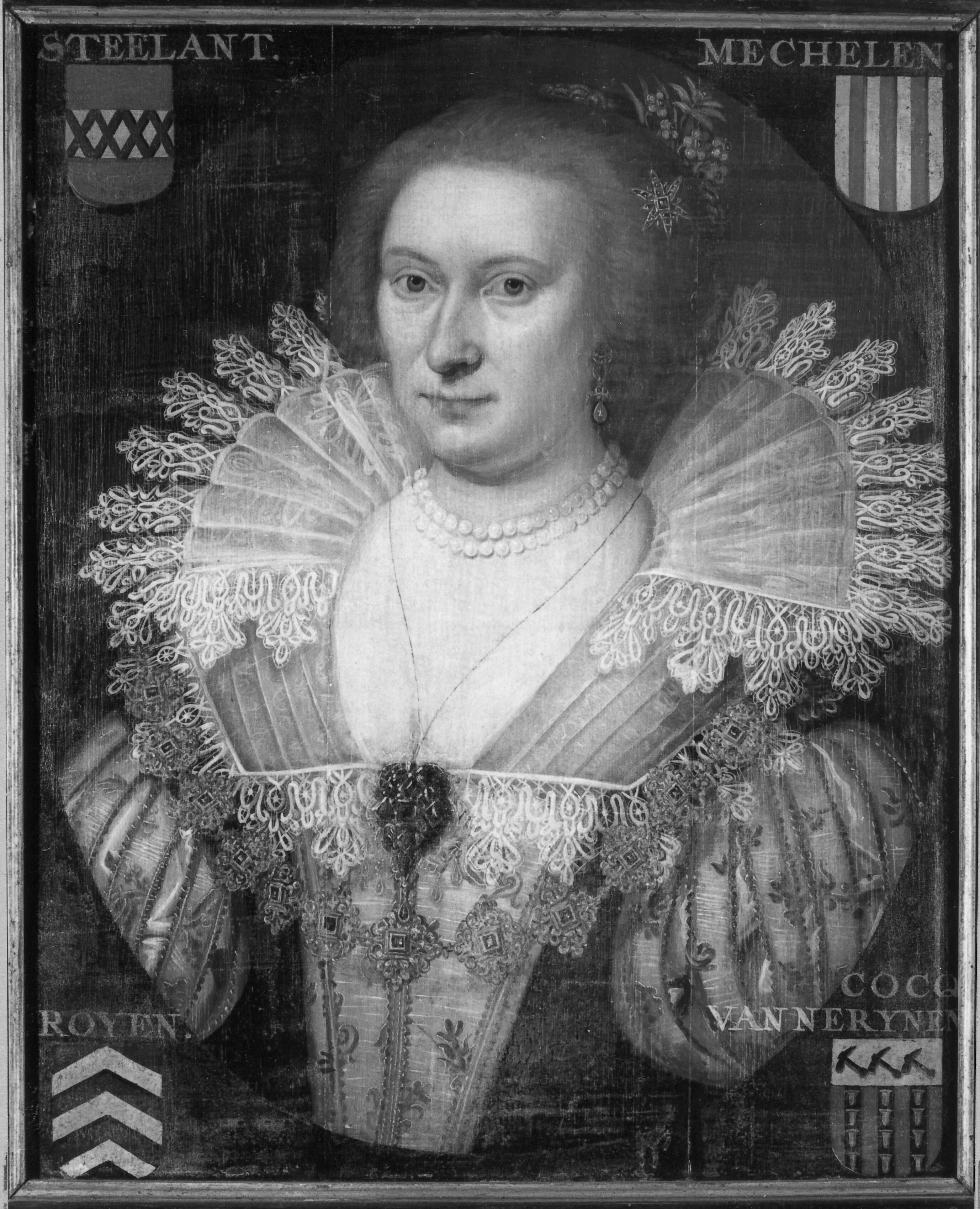 Anne Marie van Steelant (leefde circa 1602 - circa 1643), echtgenote van David van Marlot. Op het schilderij de wapens van haar vier grootouders. Datum geschat op basis van de kleding.